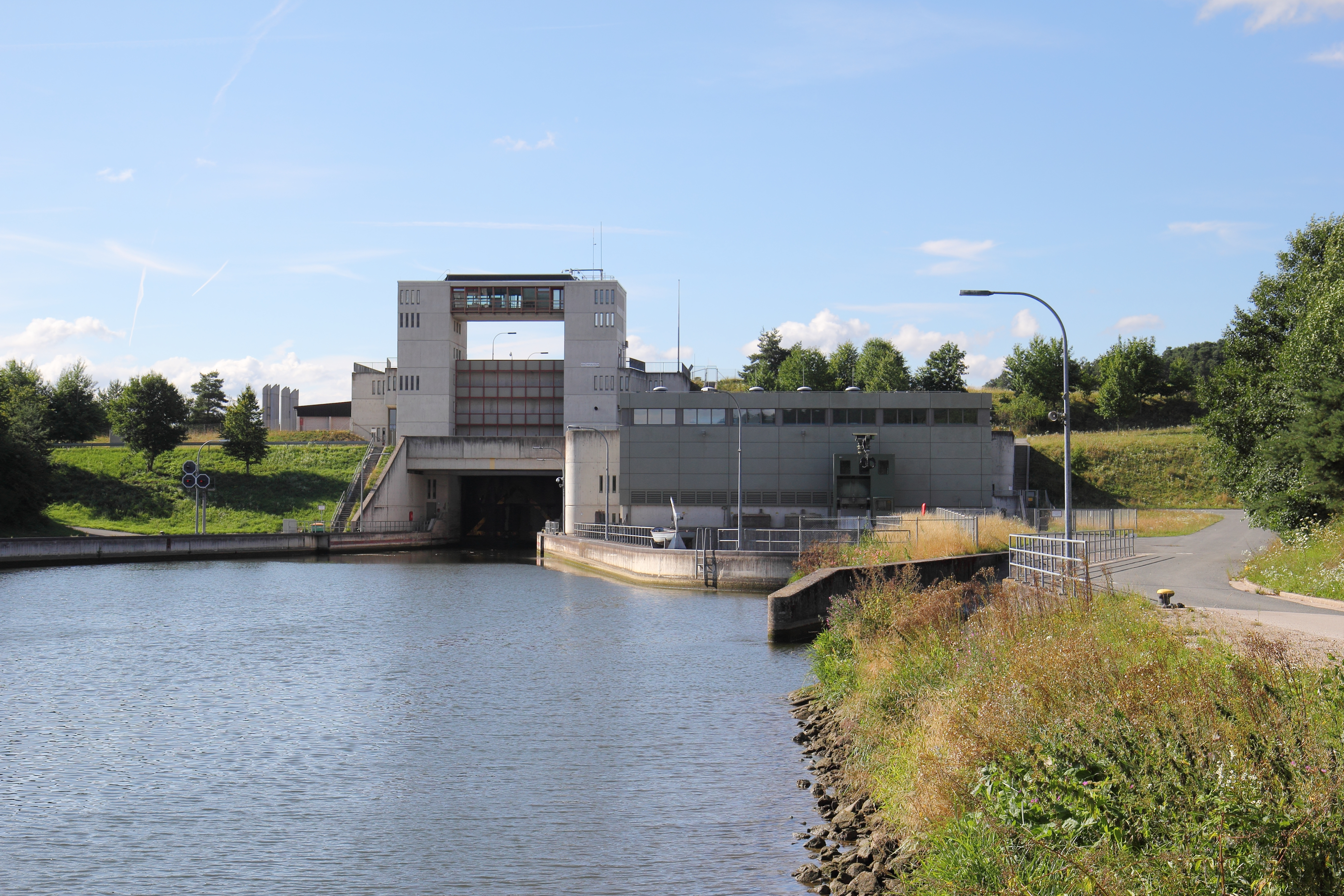 Mühlhausen (Oberpfalz) - Schleuse Bachhausen